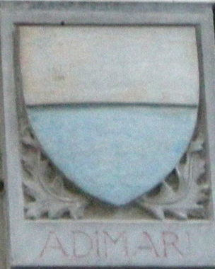 Via delle oche, stemma adimari